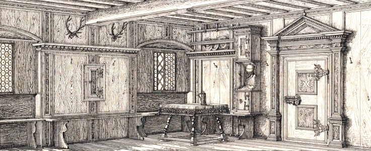 Zimmertäfelung in einem Bauernhaus bei Schönberg aus dem Jahre 1508